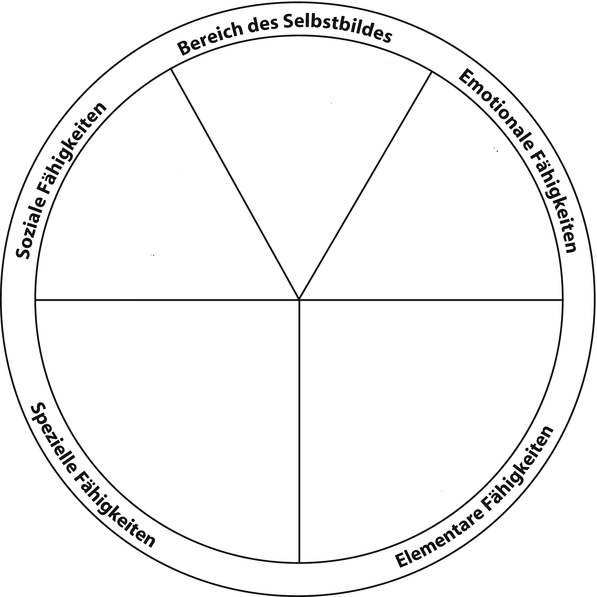 Modell des Arbeitsfähigkeitenkreis. Innere Einträge wurden von mir auf urheberrechtlichen Gründen entfernt.